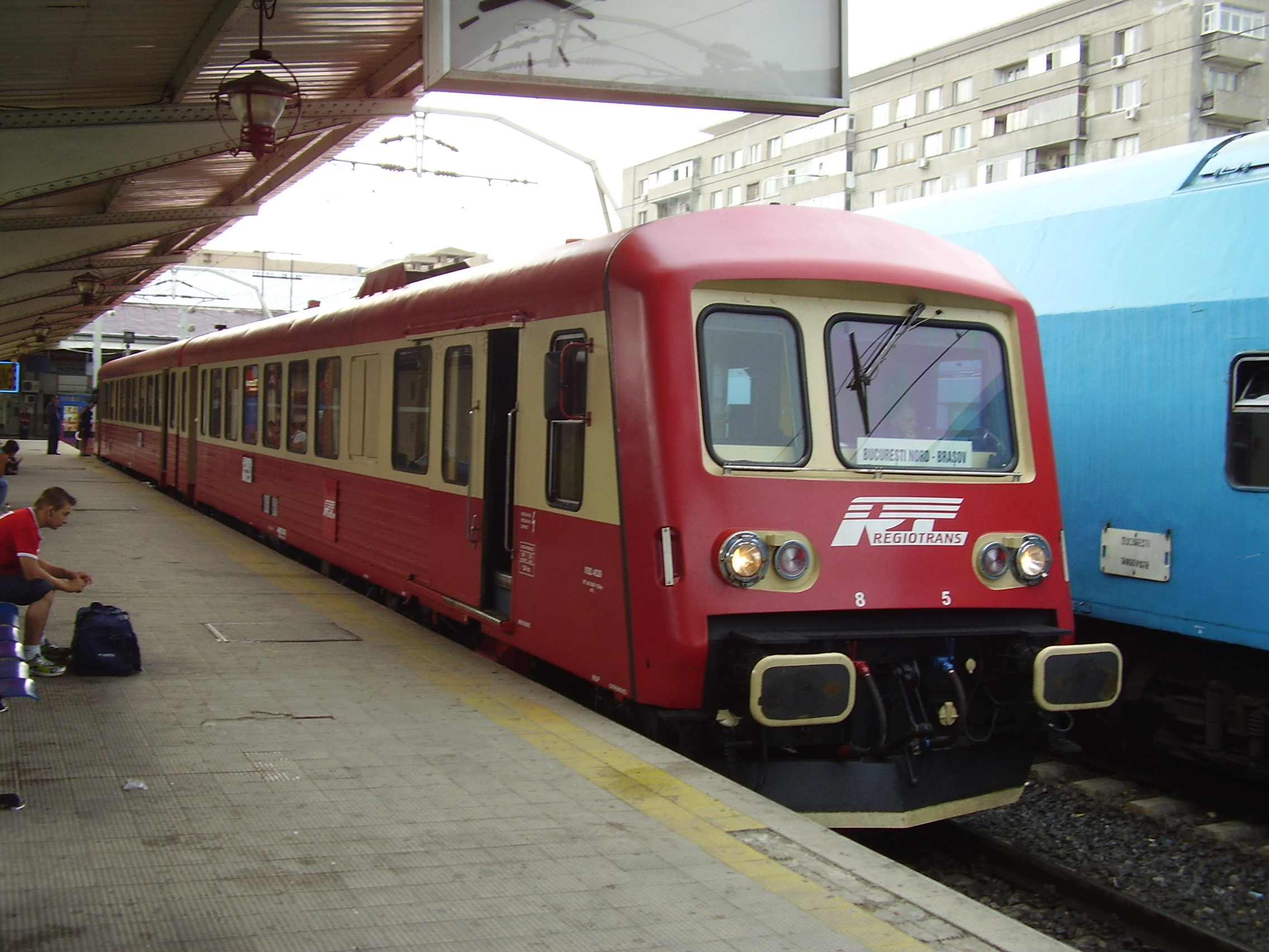 XBD4520